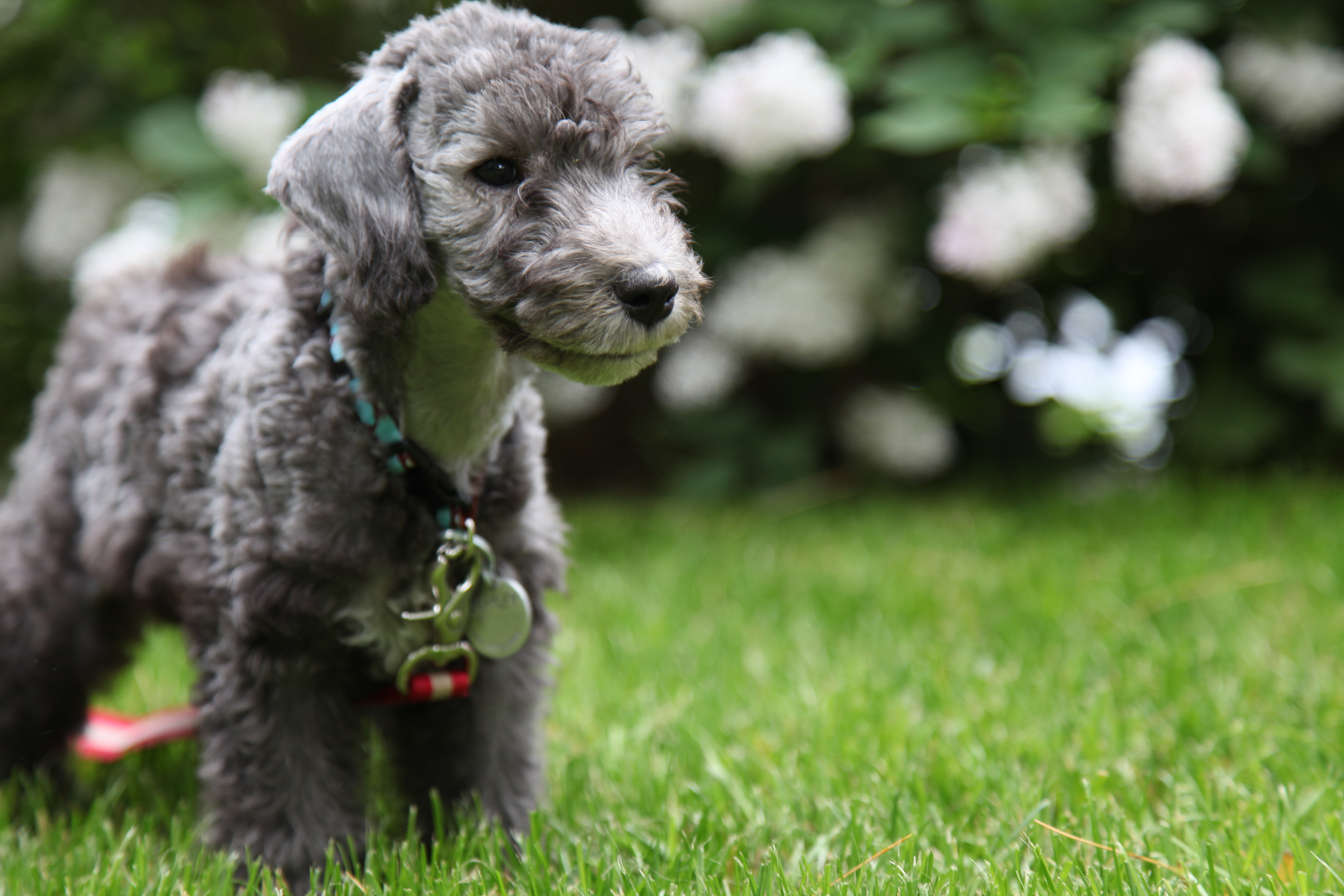 Barkley, 9 Weeks. Bedlington terrier puppy